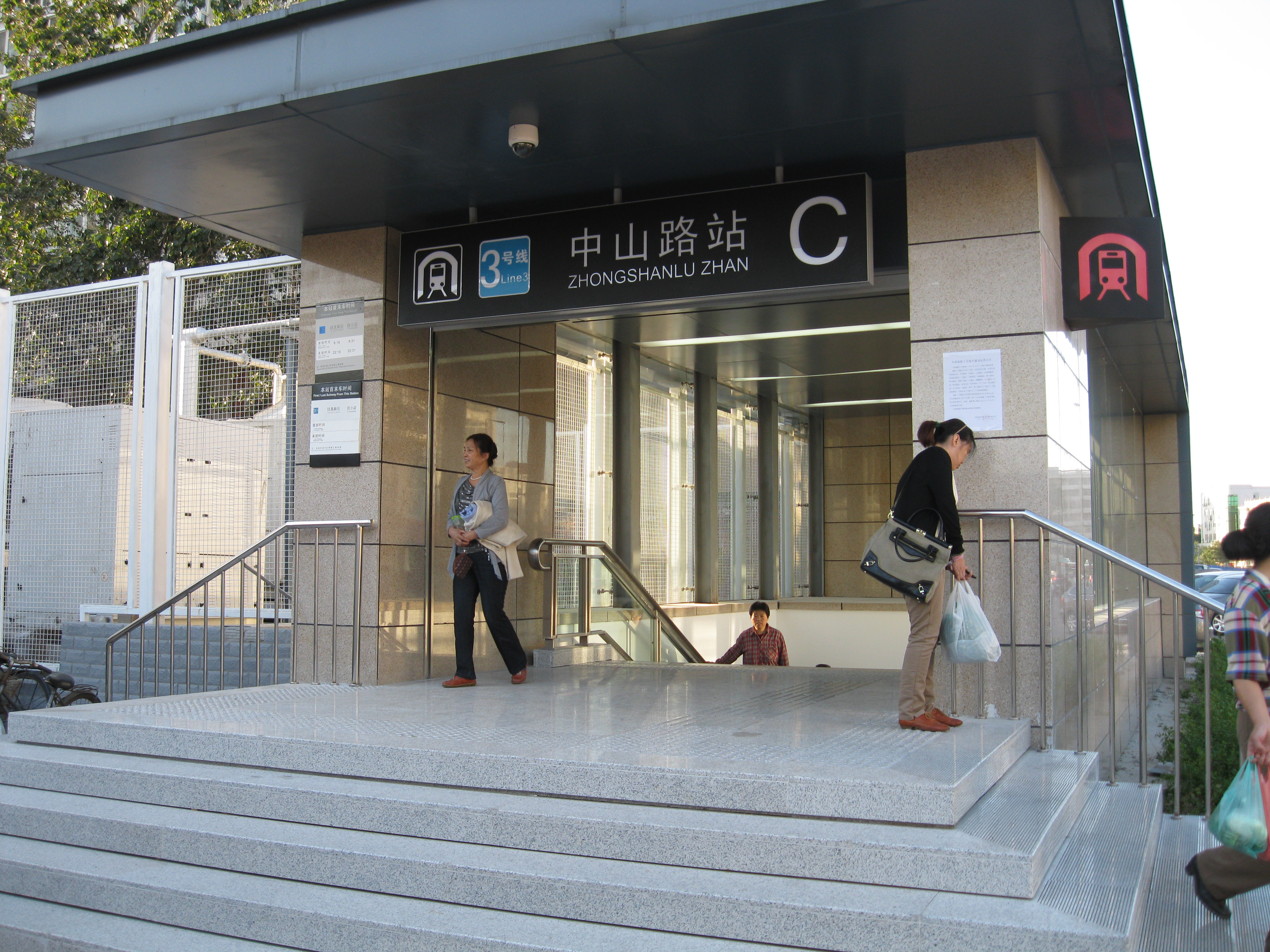 天津地鐵三號線中山路站C出口 0001